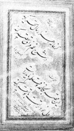 نمونه خط نستعلیق علی‌رضا عباسی، چاپ شده در مجله هنر ومردم، شمار۰ ۱۸۹-۱۹۰ (تير و مرداد ۱۳۵۷)